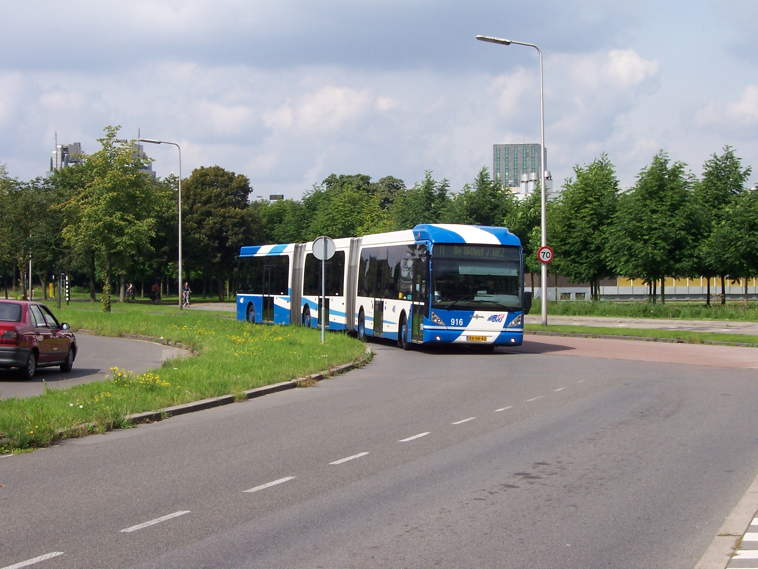 Deze zelfgemaakte foto is bij de Botanische tuinen in Utrecht genomen op 24 augustus 2005